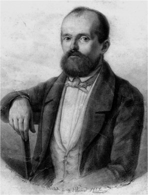 Domenico Buffa (1818-1858), politico e scrittore. Da un ritratto di Biagio Torrielli (1826-1894). Fonte: Archivio Accademia Urbense di Ovada. Pubblicazione: URBS, Trimestrale dell'Accademia Urbense, suppl. al n.1, marzo 2011, pag. 20.